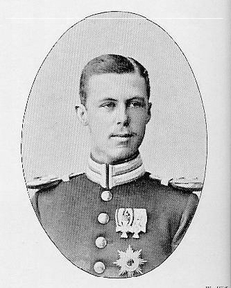 Ks.Friedrich Heinrich von Preussen